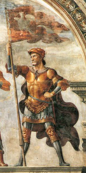 GHIRLANDAIO, Domenico Decoration of the Sala del Gigli Fresco Palazzo Vecchio, Florence